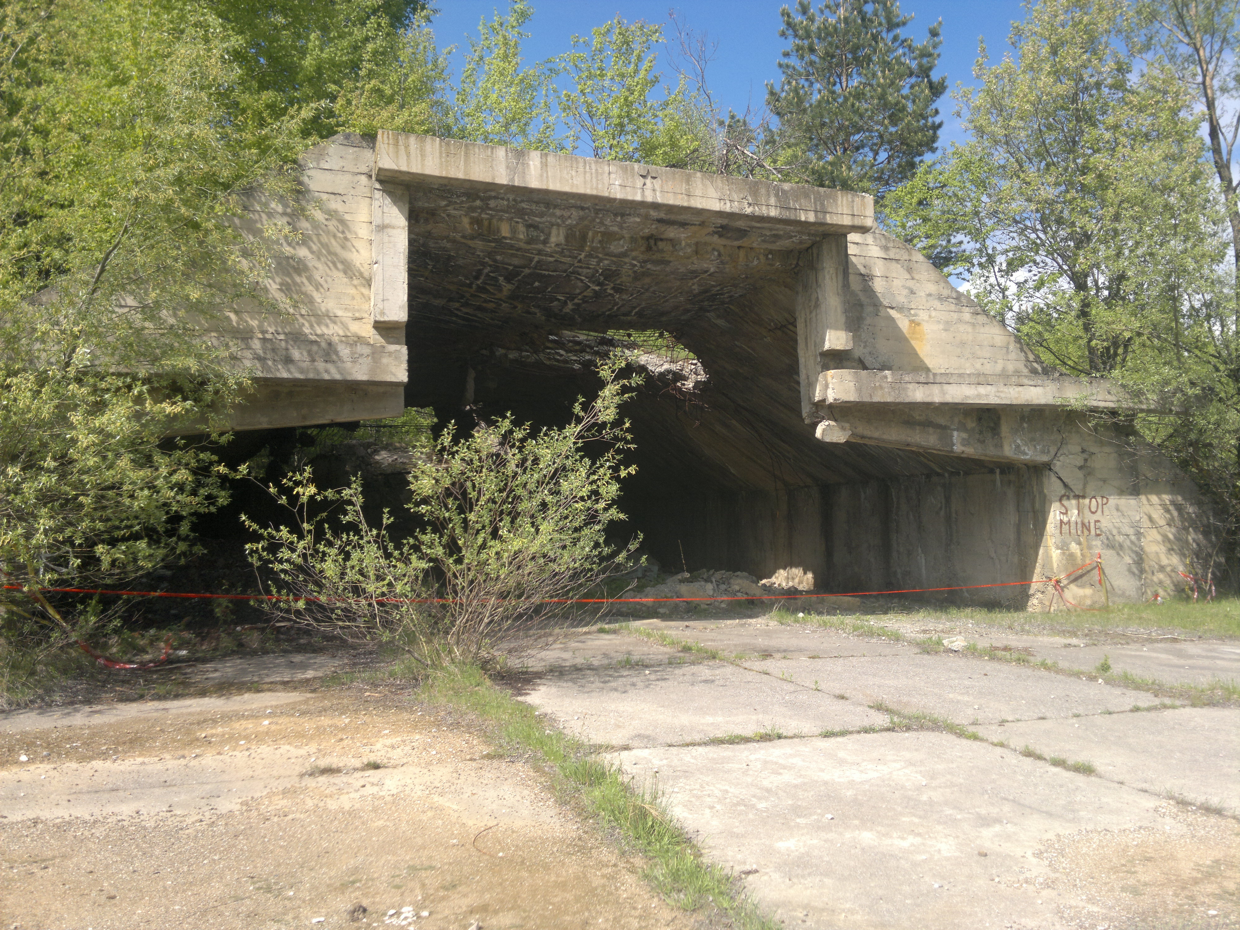 Arhitektura nato bombi